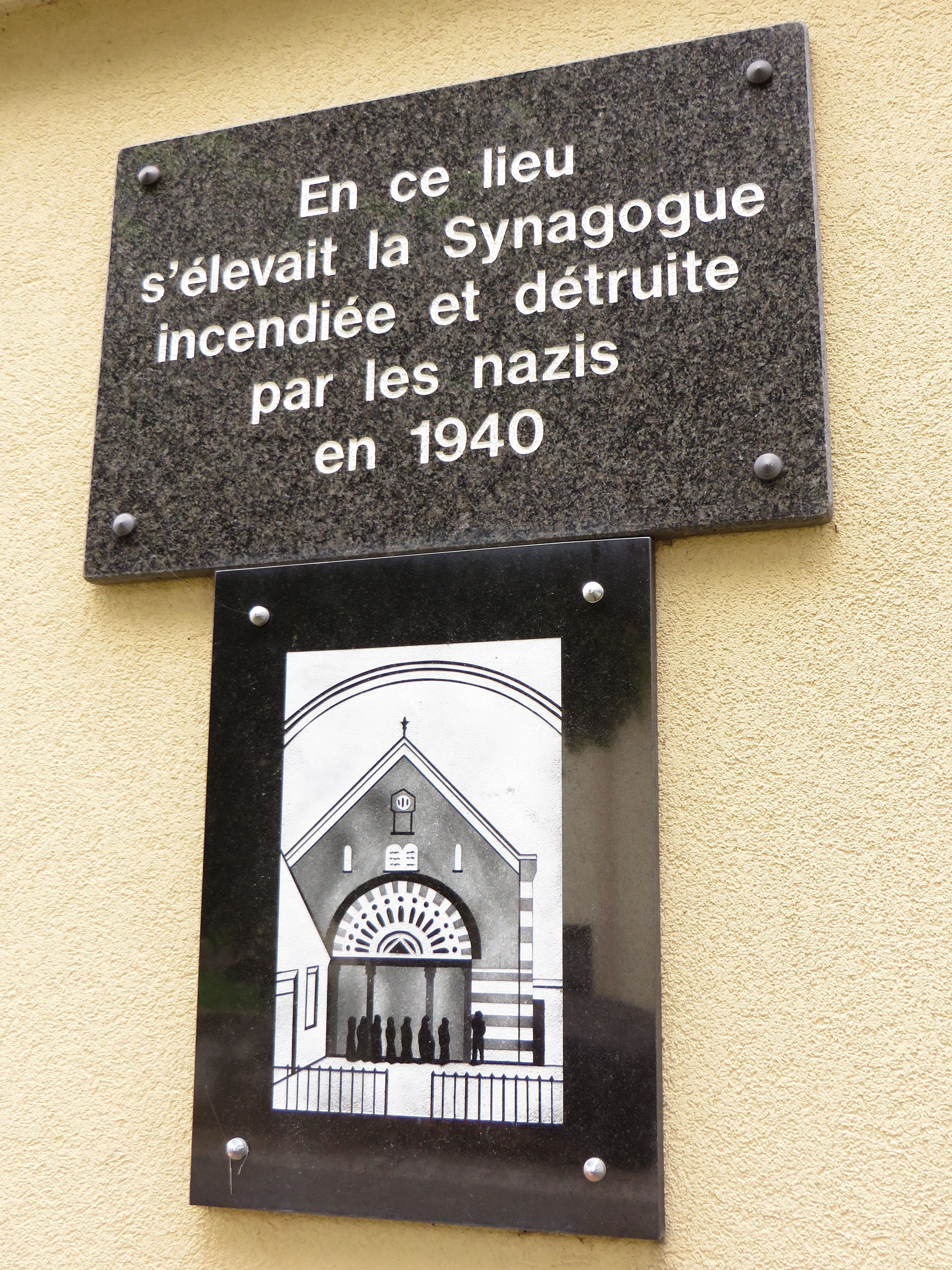 Hellimer plaque synagogue